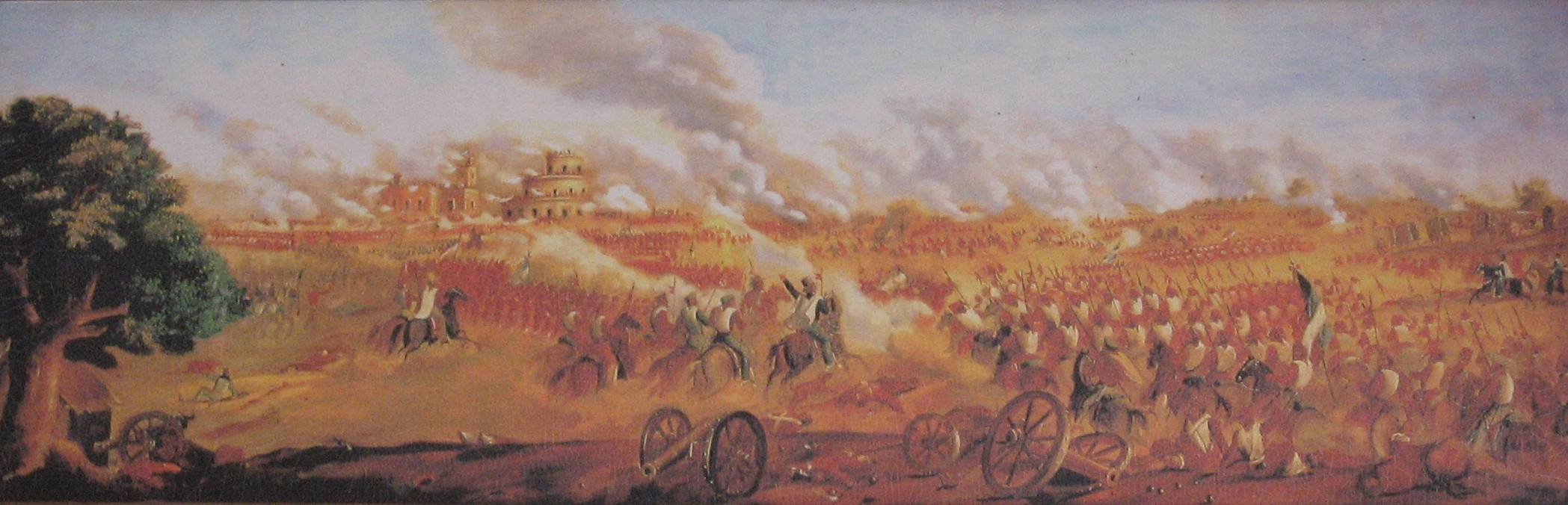 Retrato de la Batalla de Caseros, conservado en el Palacio San José